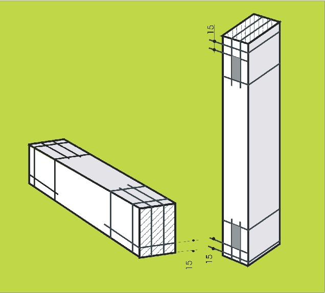 zelfgemaakte afbeelding voor het publiek domein van Wikipedia. Martink.